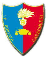 Scudetto dell'11° Brigata Carabinieri (1963-2000)